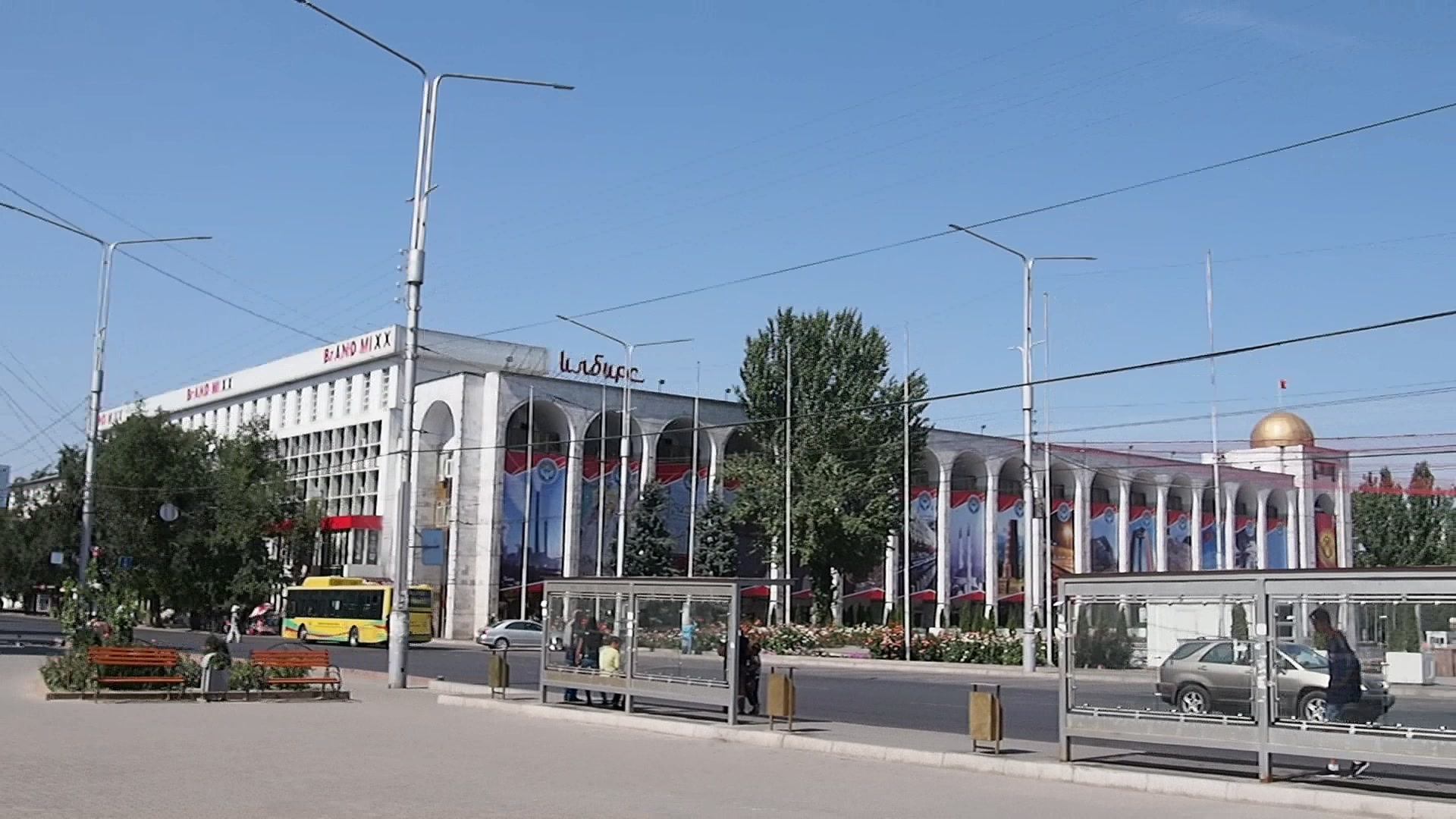 P9170506 180